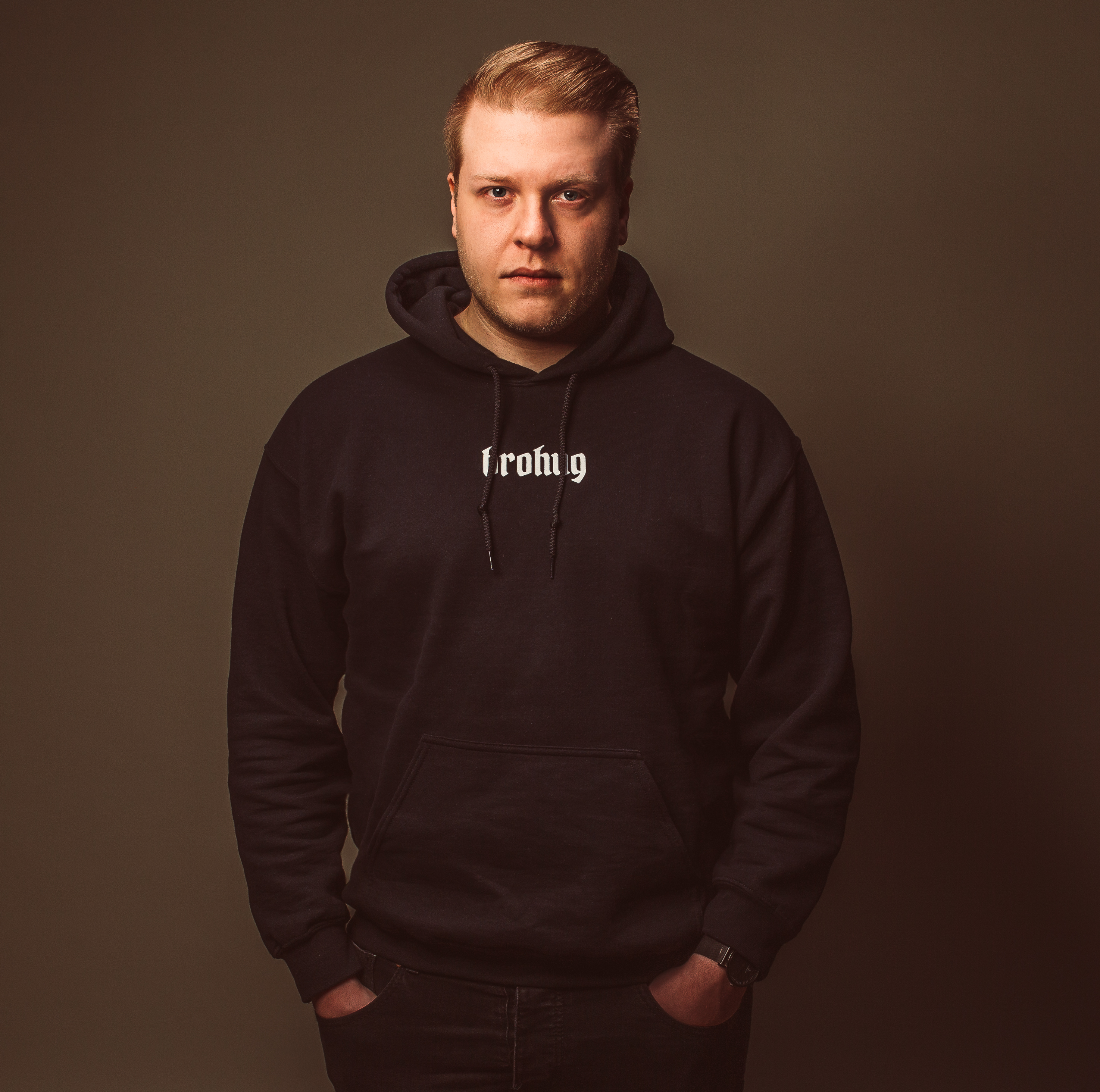 Dario Rodriguez DJ